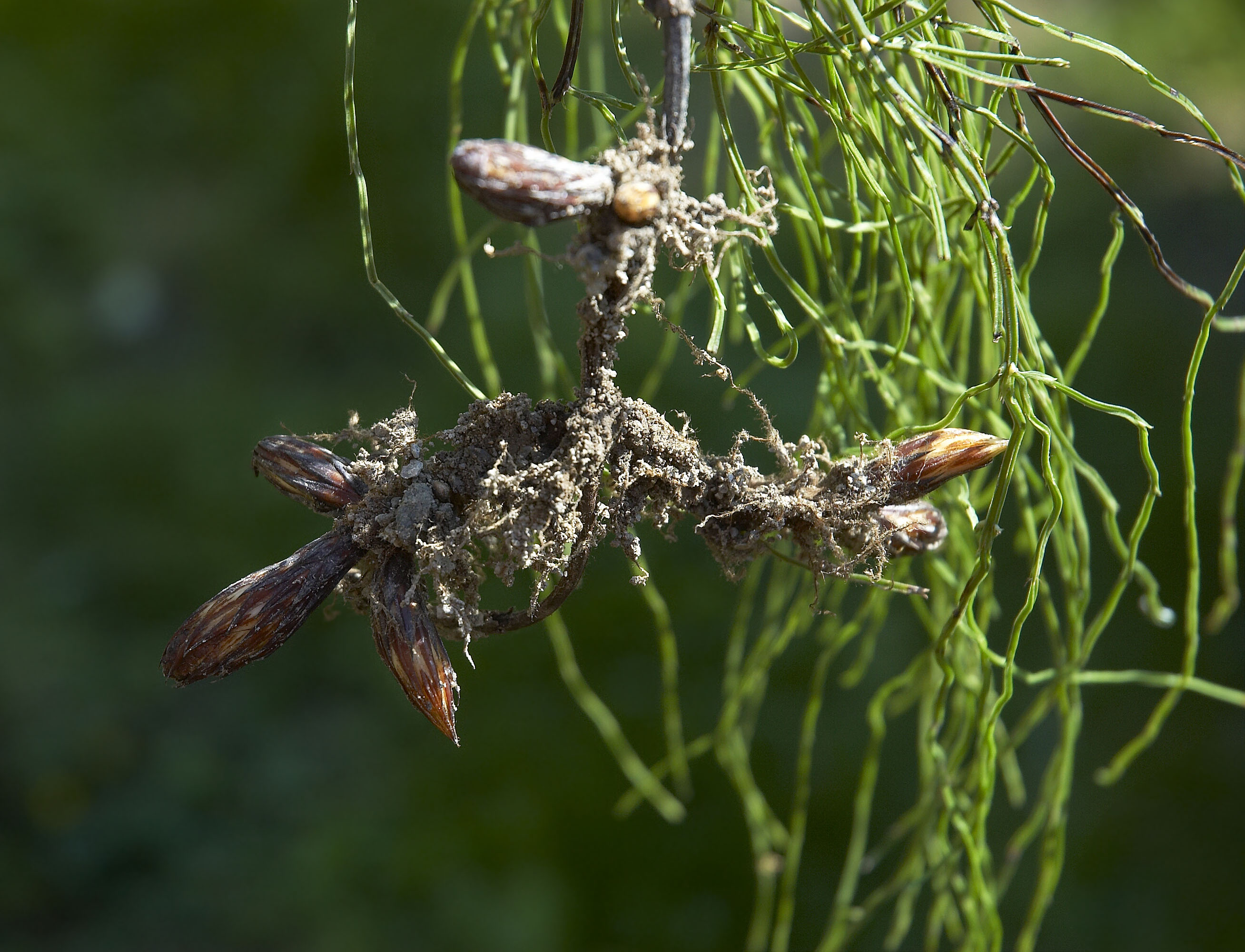 Equisetum arvense